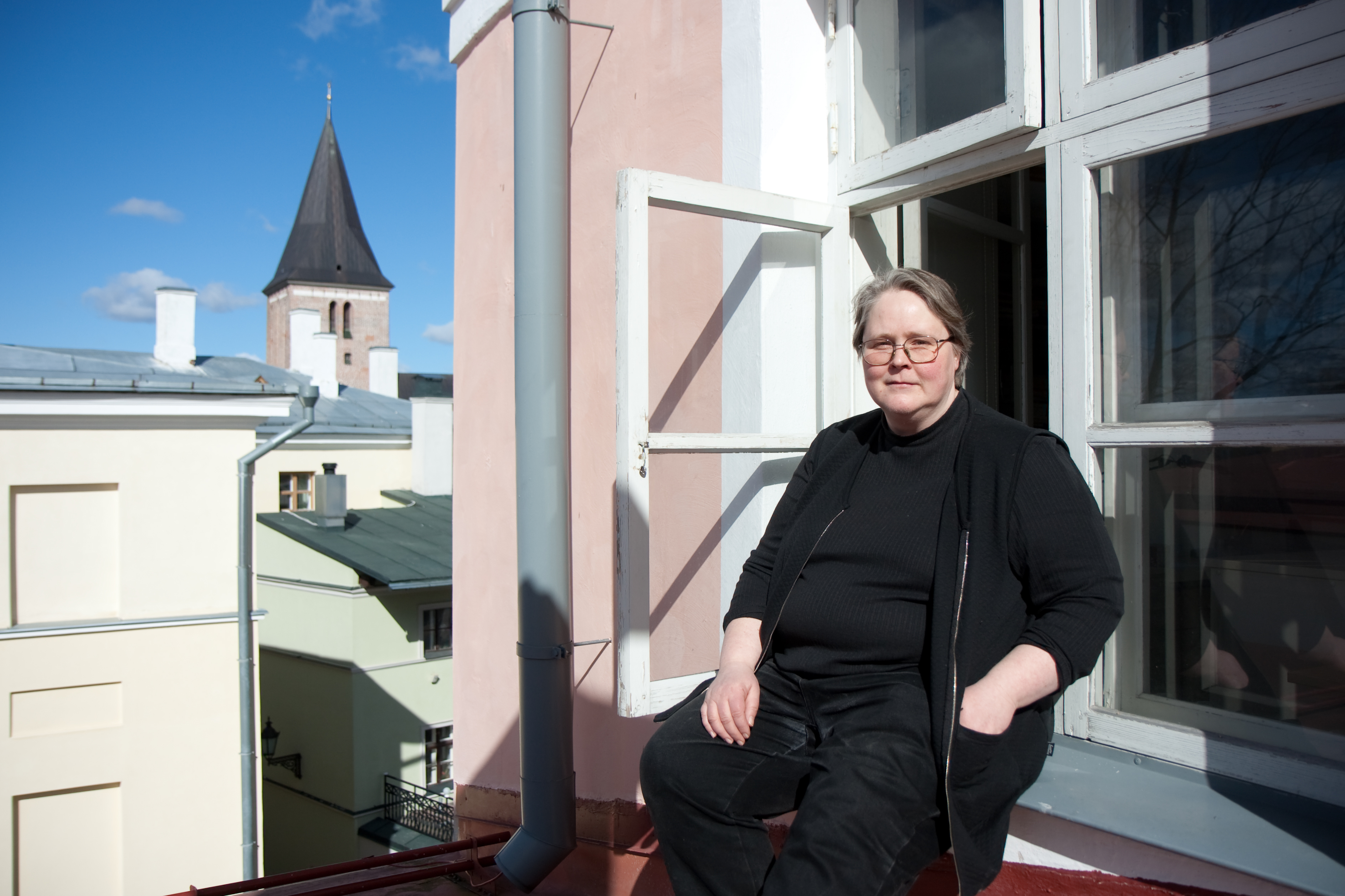 Pildil religiooniloolane Marju Lepajõe Tartu Ülikooli katusel.